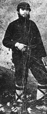 Diko Dzhelebov